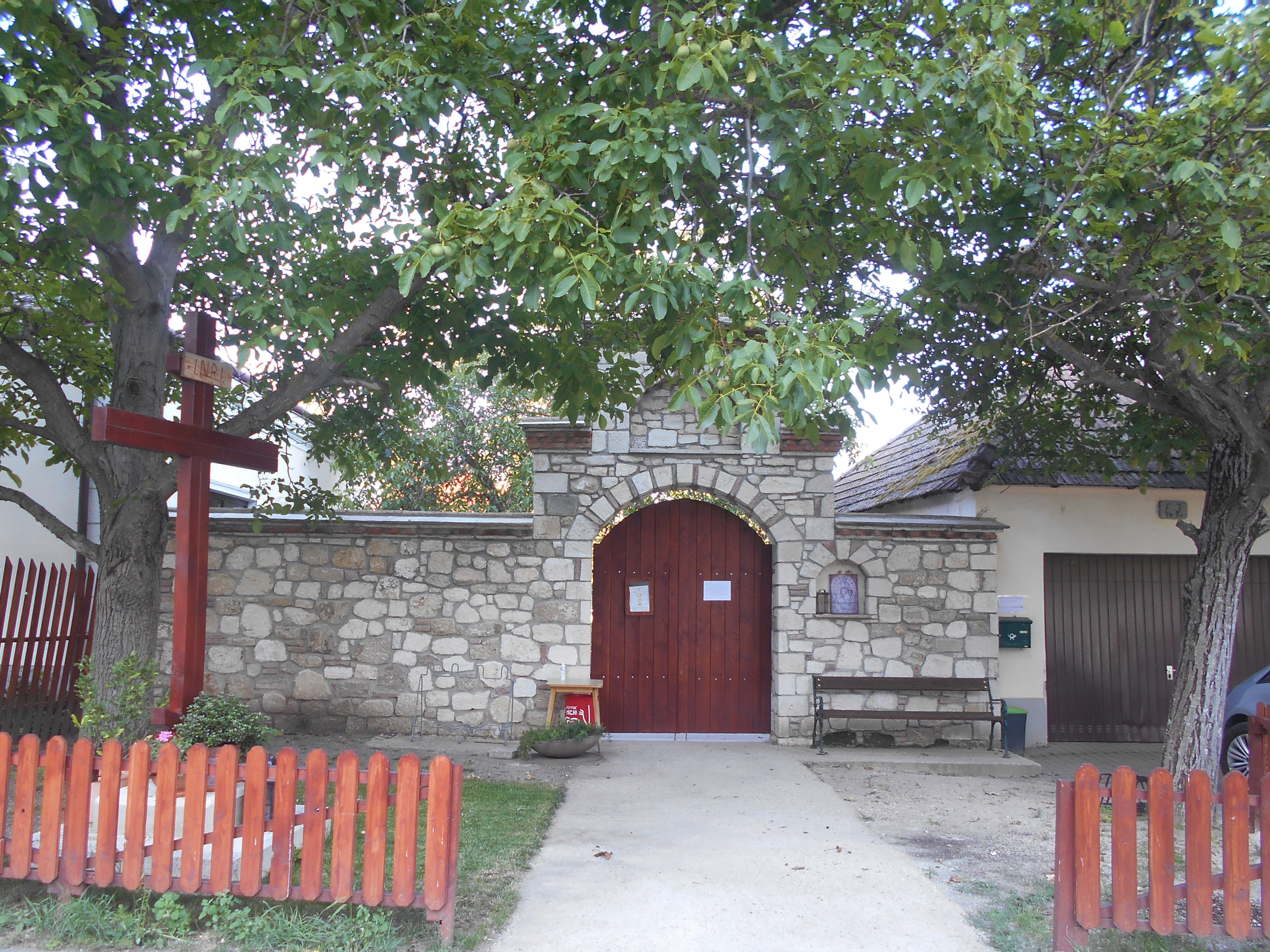 Portal des Griechisch-orthodoxen Klosters in St. Andrä am Zicksee Diese Datei wurde im Rahmen von WikiDaheim 2020 in Österreich erstellt und hochgeladen.Sie wurde dem Themenbereich Bilderwünsche zugeordnet.